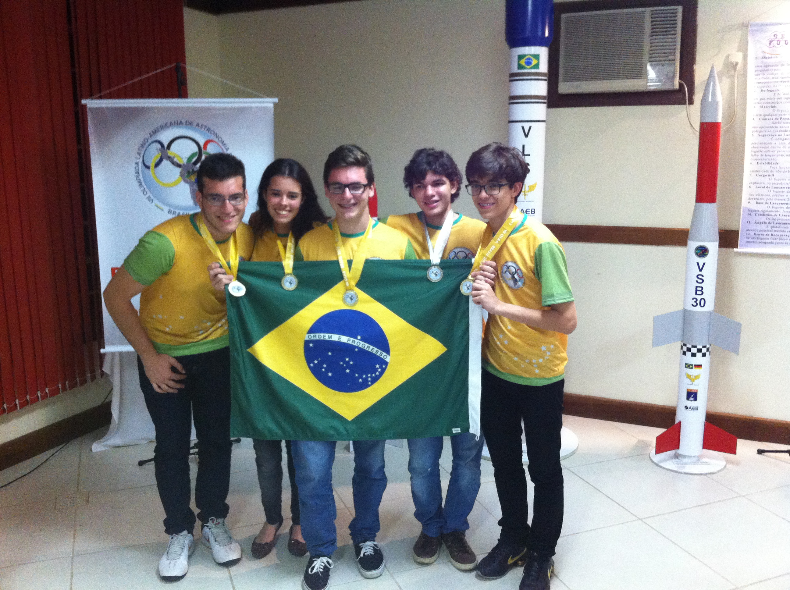 Equipe brasileira que disputou a VII OLAA.